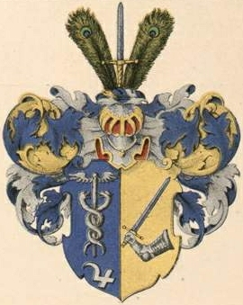 Bradke suguvõsa aadlivapp